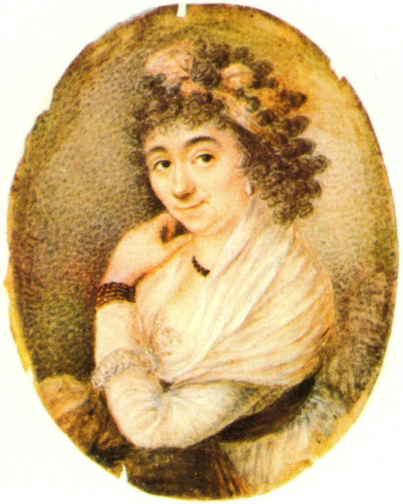 Мария Луиза Элизабет Виже-Лебрен (Marie-Elisabeth Loise Vigee-Lebrun (Vigee Le Brun) (1755 - 1842) Портрет Анны Давиа Бернуцци 1790-е гг. Кость, акварель, гуашь,. 6,4x5,2 см (овал) Государственный Русский музей